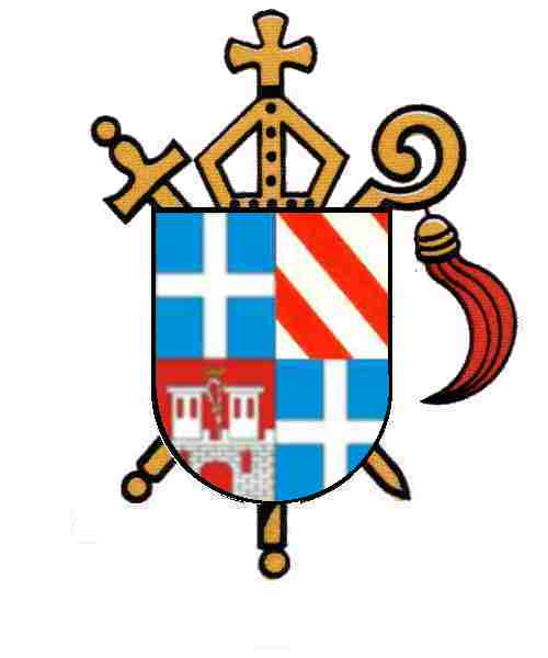 Wappen Marquard von Hattstein, 1529-1581, Fürstbischof von Speyer und Fürstpropst von Weißenburg (1560-1581)